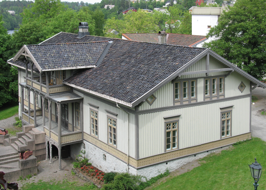 Langsæ gård i Arendal, Aust-Agder kulturhistoriske senter. Gårdens hovedbygning fra 1857, en av de første sveitserstilbygninger i Aust-Agder. Malt i husets originale farger, som er avdekket i undersøkelser av Riksantikvaren.